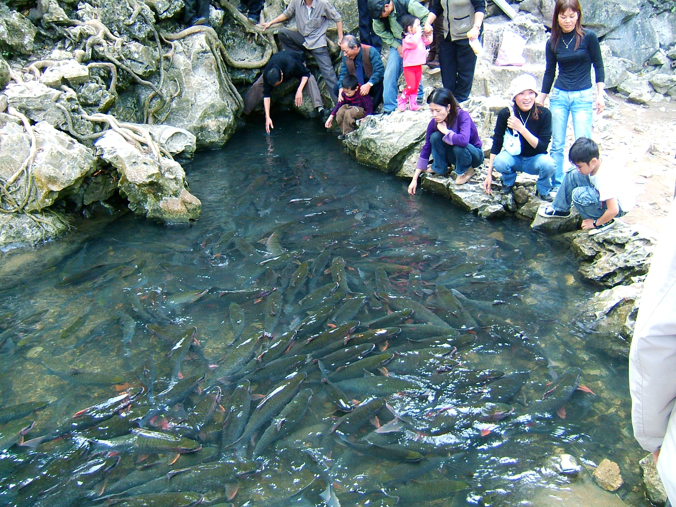 Suoi ca Cam Luong